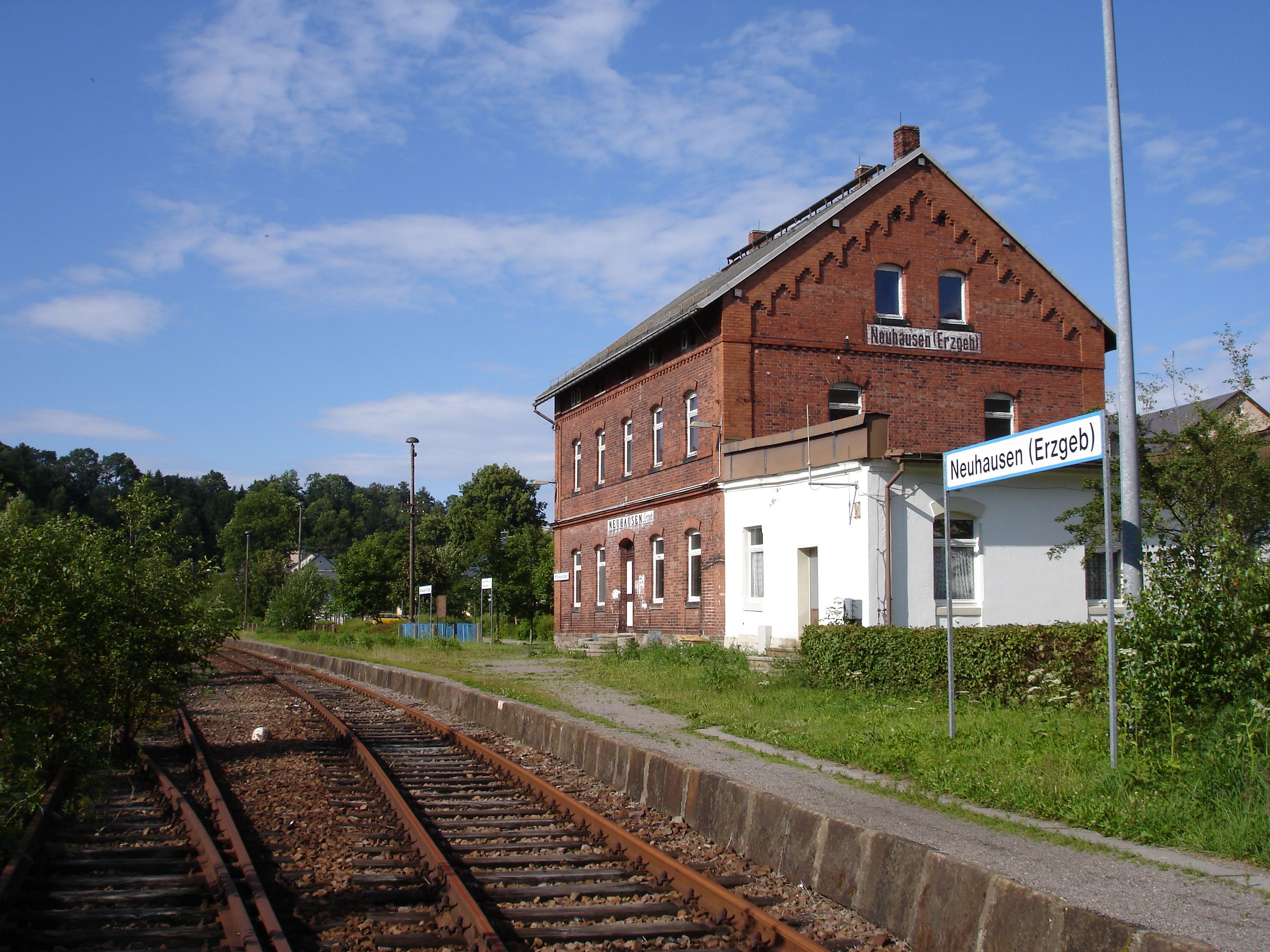 Bahnhof Neuhausen (Erzgeb), Bahnstrecke Pockau-Lengefeld–Neuhausen